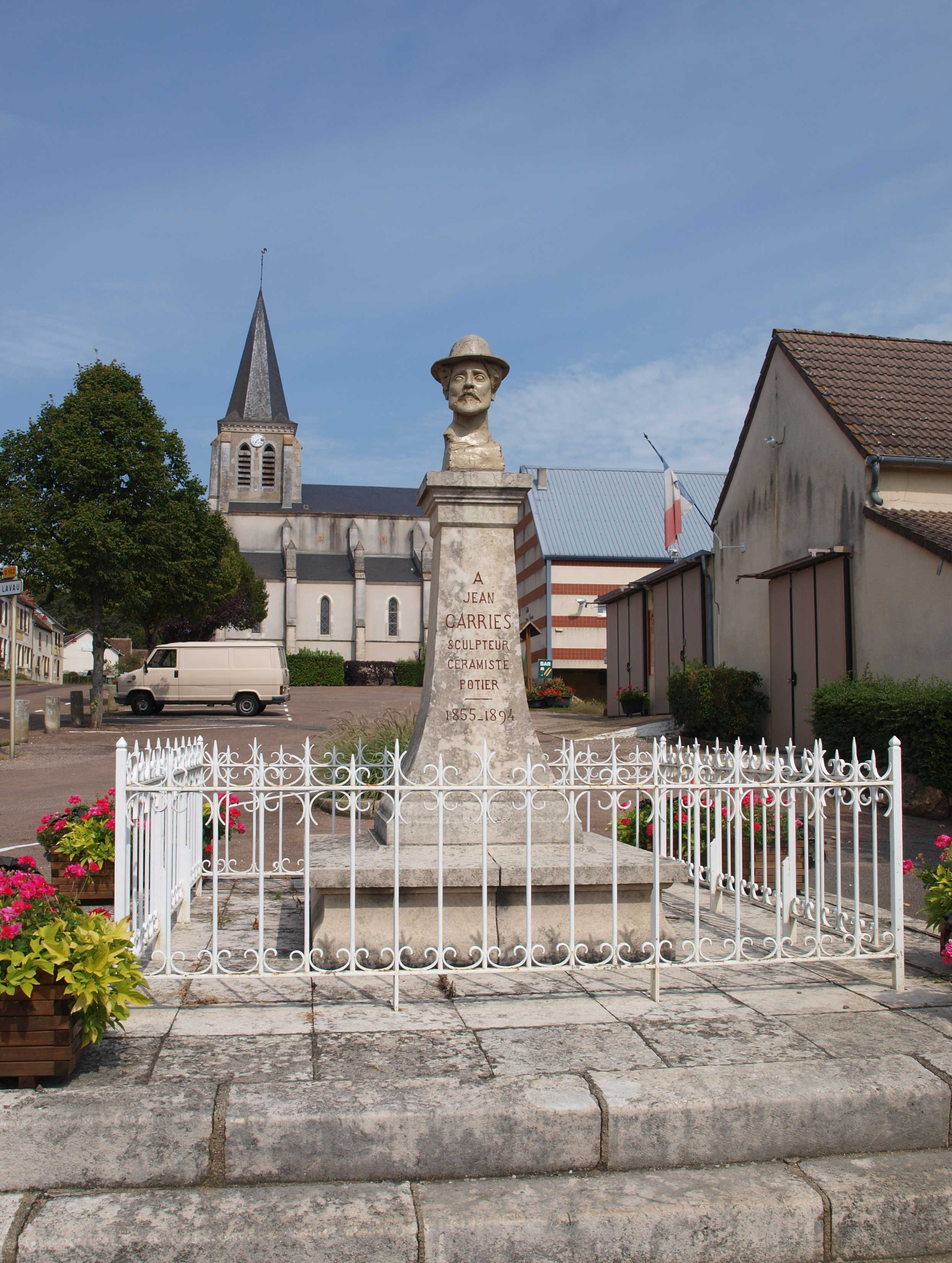 Arquian (Nièvre, France) ; le monument à Jean Carriès